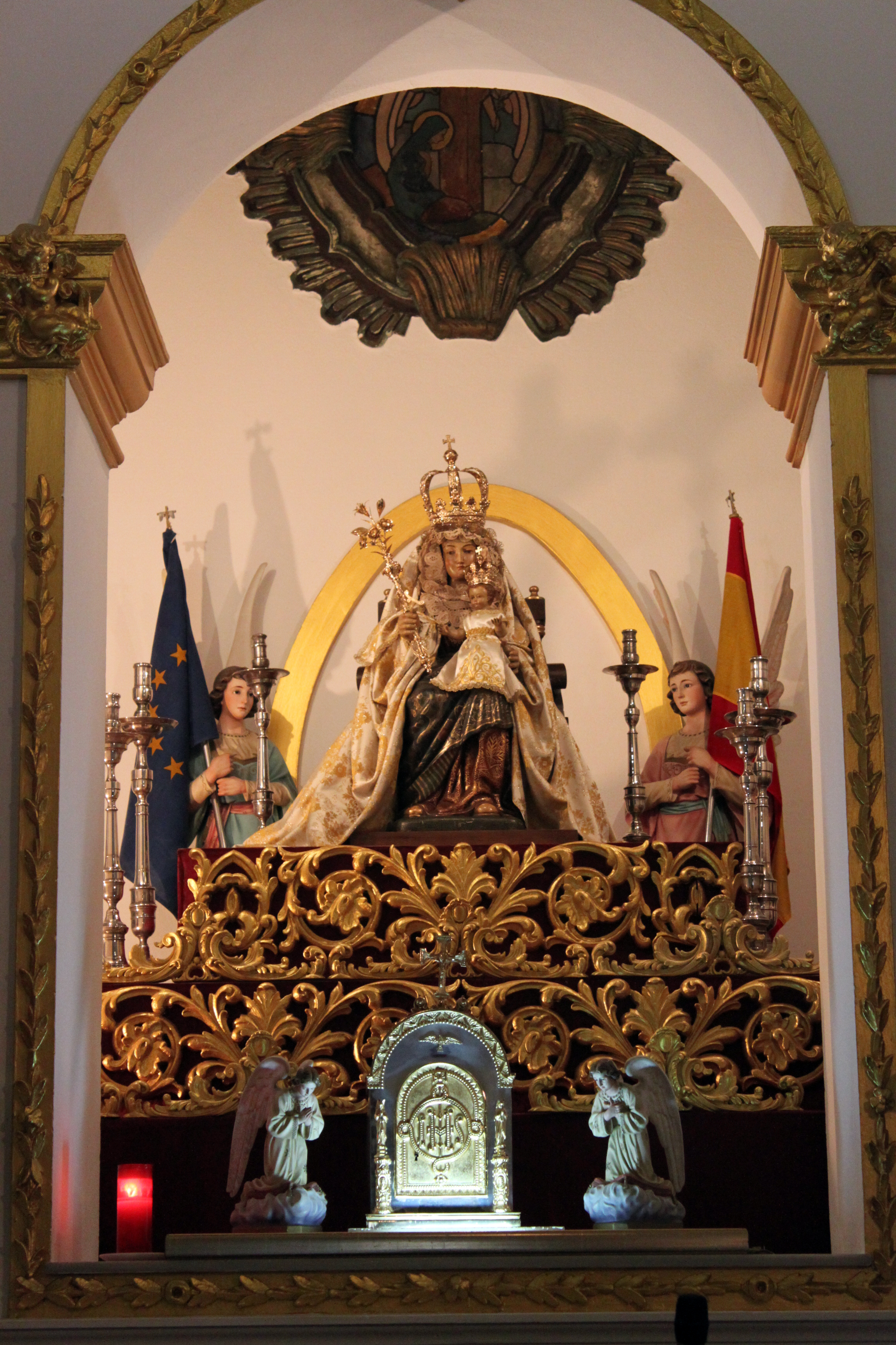 Capilla de Nuestra Señora de Europa. Altar mayor con la réplica de la Virgen de Europa de 1864. Algeciras, Andalucía, España.